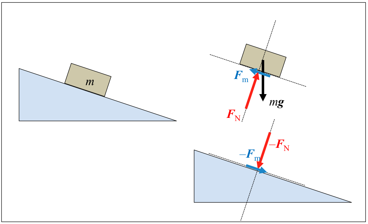 Plano inklinatuare gainean dagoen gorputz errektangeluarrak eta planoak berak jasaten dituen indarren analisi grafikoa.